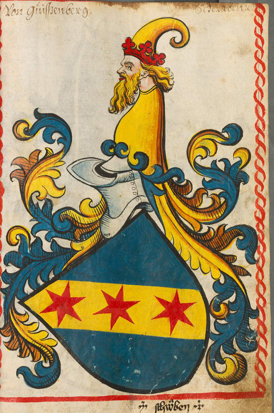 Scheibler'sches Wappenbuch, älterer Teil Güss von Güssenberg